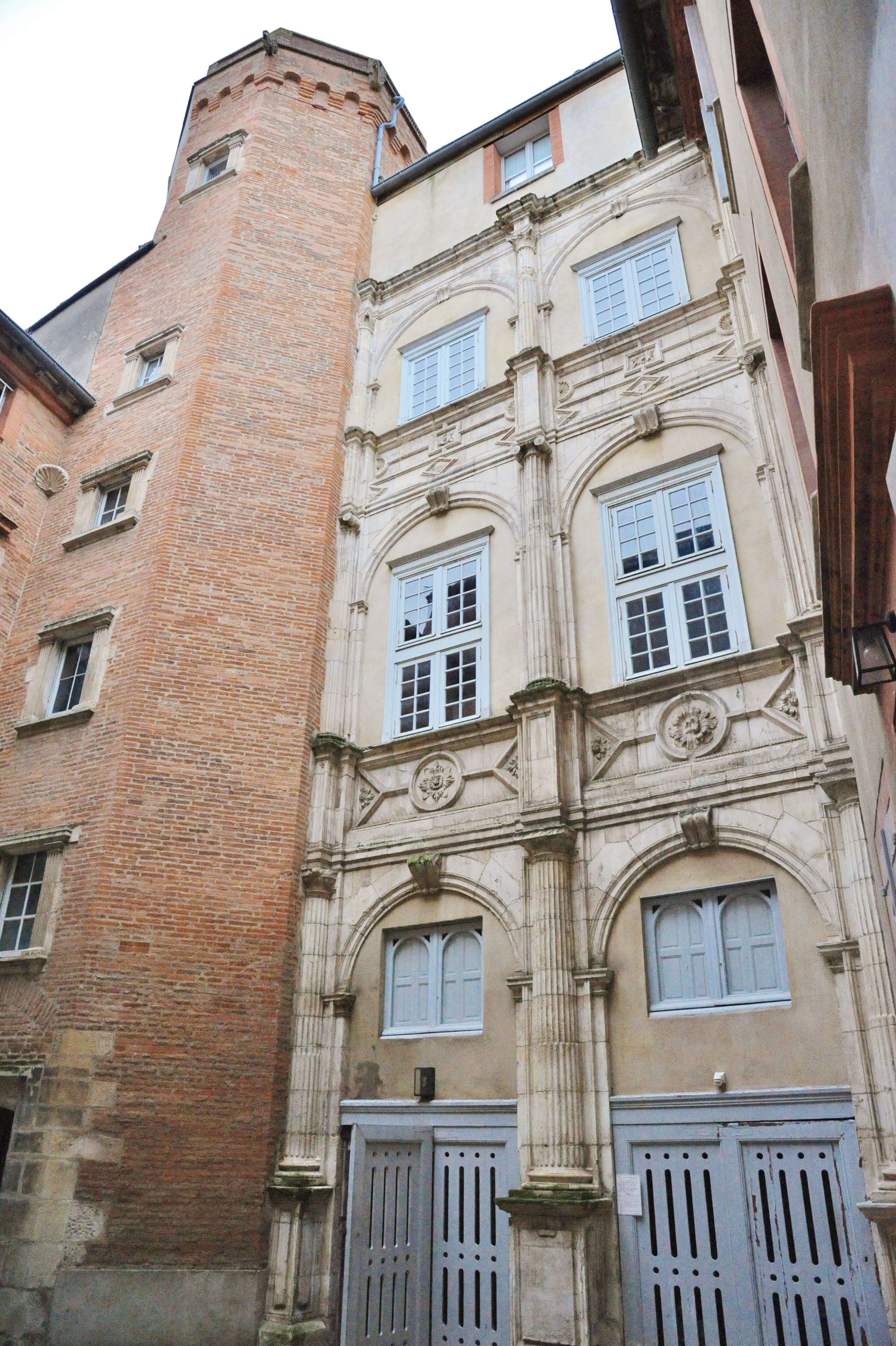 Cour de l'hôtel de Lamamye, avec façade Renaissance en pierre et tour d'escalier en brique. Vers 1540, Toulouse.